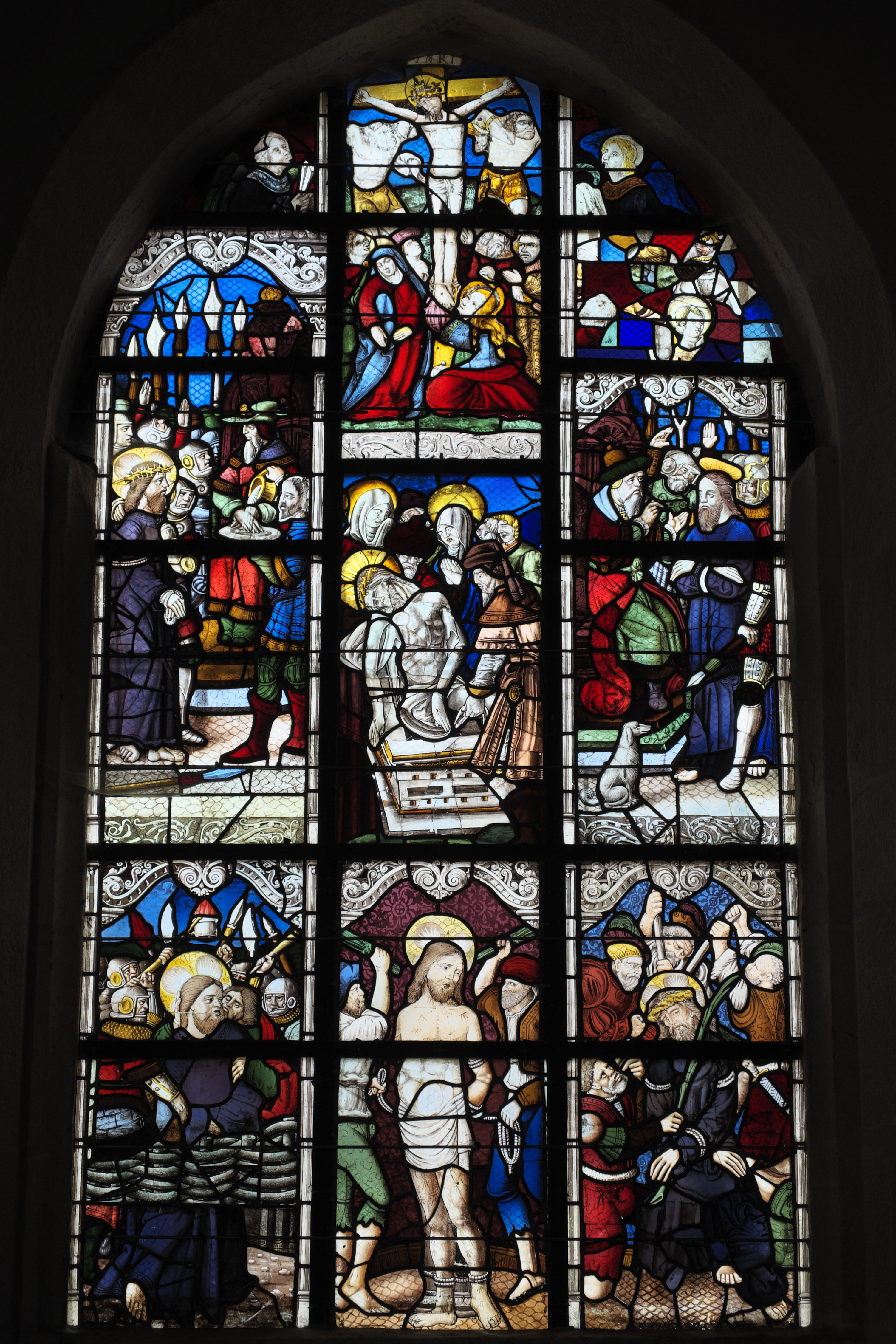 Katholische Kirche Saint-Nicaise in Saint-Nic im Département Finistère (Region Bretagne/Frankreich), Bleiglasfenster (baie 1) aus dem späten 16. Jahrhundert und um 1600; Darstellung: Szenen der Passion Christi